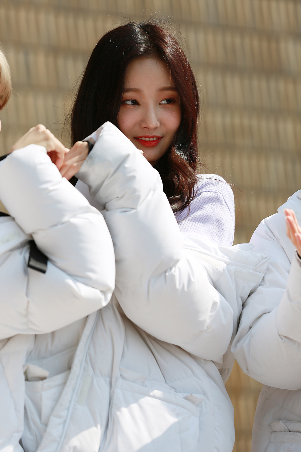 180323 모모랜드 뿜뿜 뮤직뱅크 막방 미니팬미팅